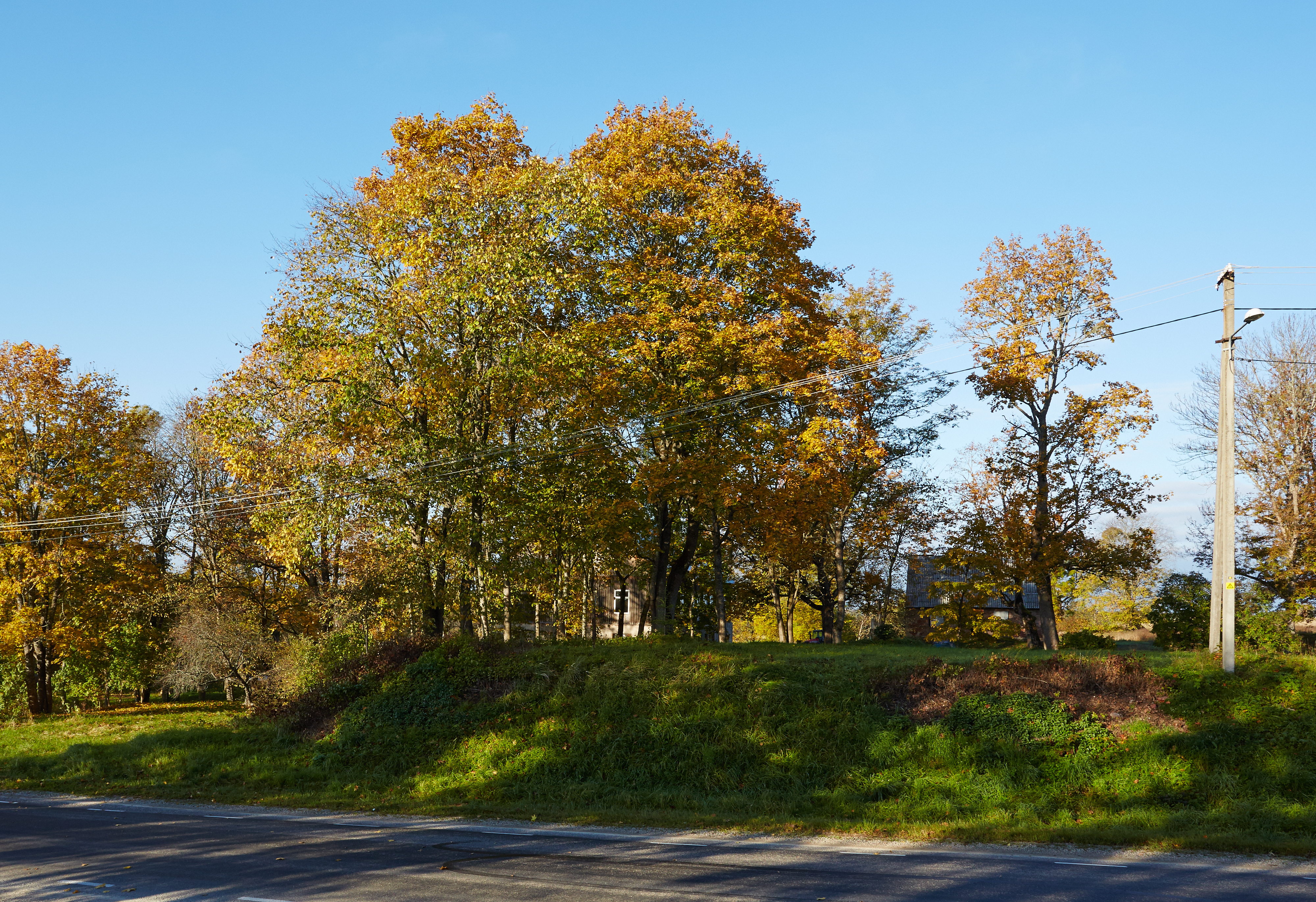 Vaabina linnuse territoorium